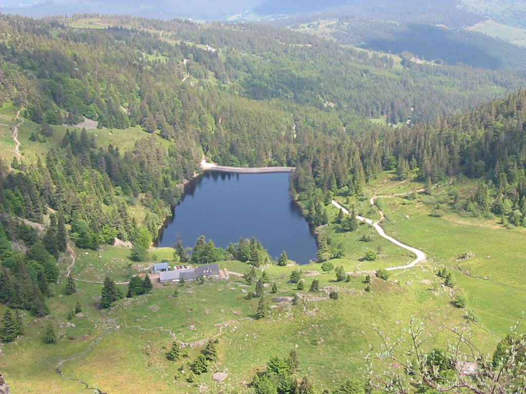 Le Forlet : lac des Truites Commune de Soultzeren (Haut-Rhin). En bas à gauche, l'ancienne mare aux Carpes devenue tourbière. Vue prise du Gazon de Faîte (1303 m).